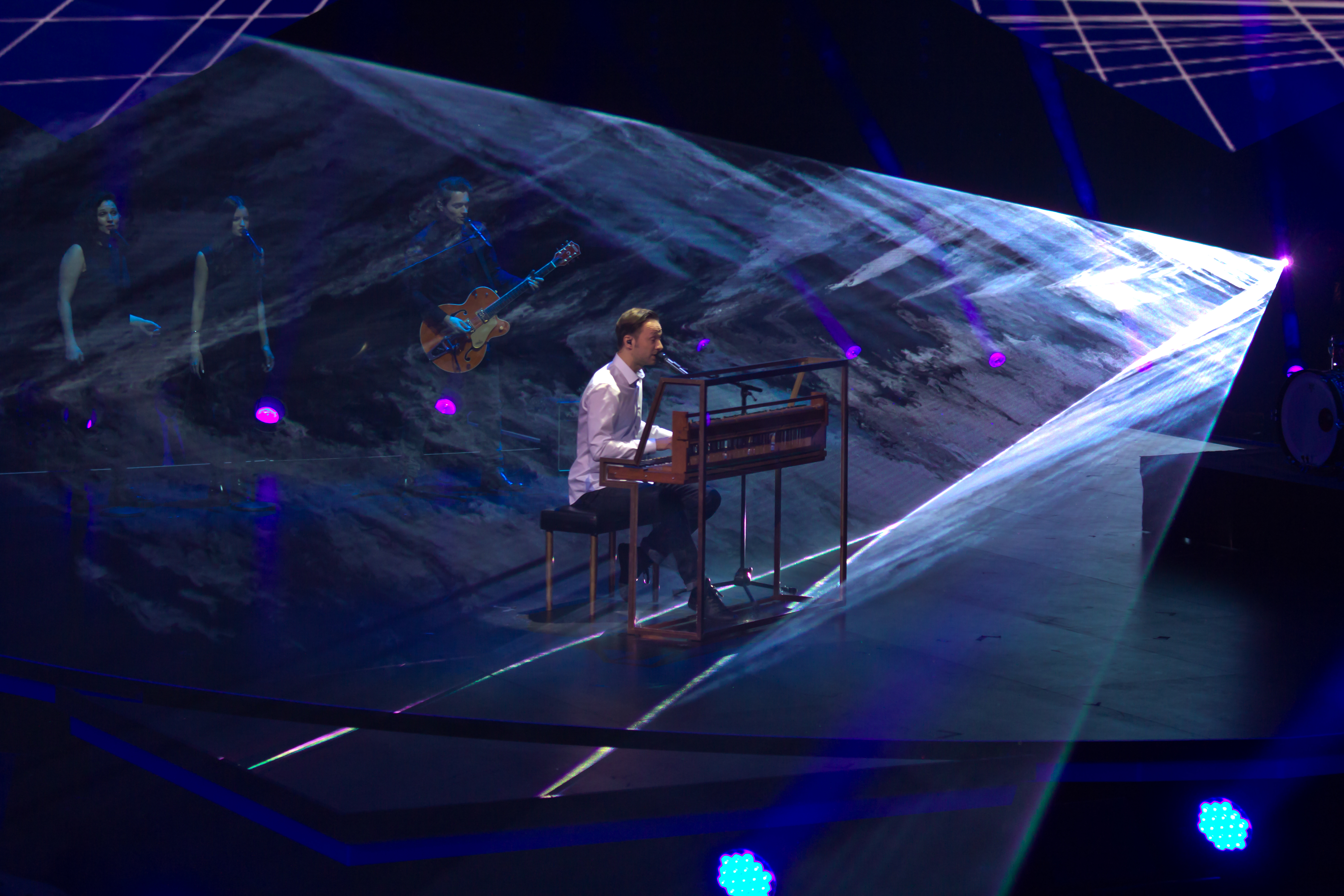 Unser Song für Dänemark - Livesendung Foto: Auftritt von Das Gezeichnete Ich